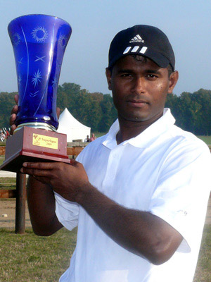 Capitaine Vainqueur et Trophée Superligue 2009 France Cricket